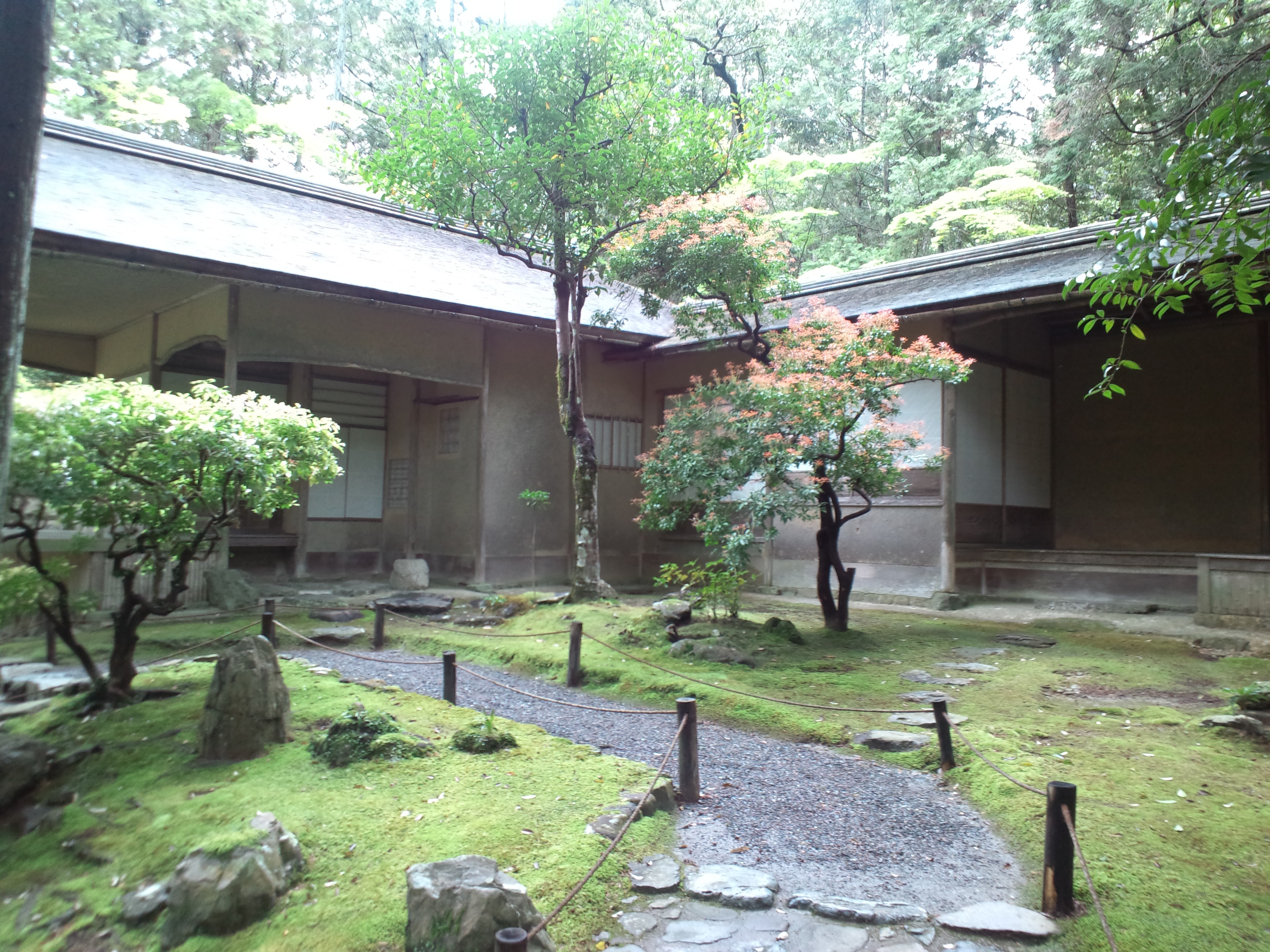 西芳寺 湘南亭茶室